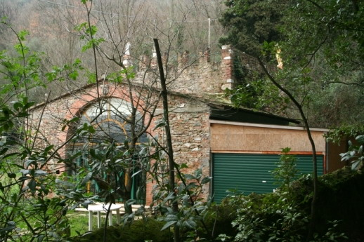 A.Bacci, Borgo di Corliano, Fornace, 2008